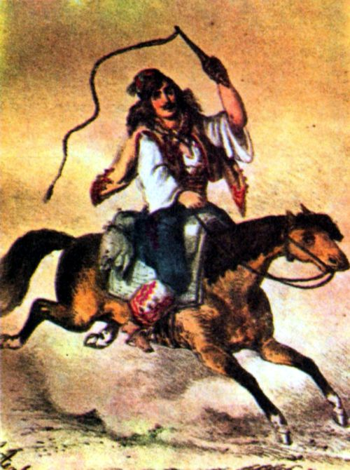 Moldavian postman